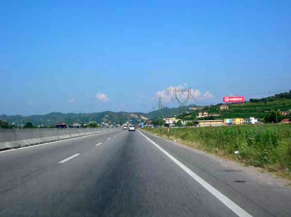 Autobahn Tirana-Durres